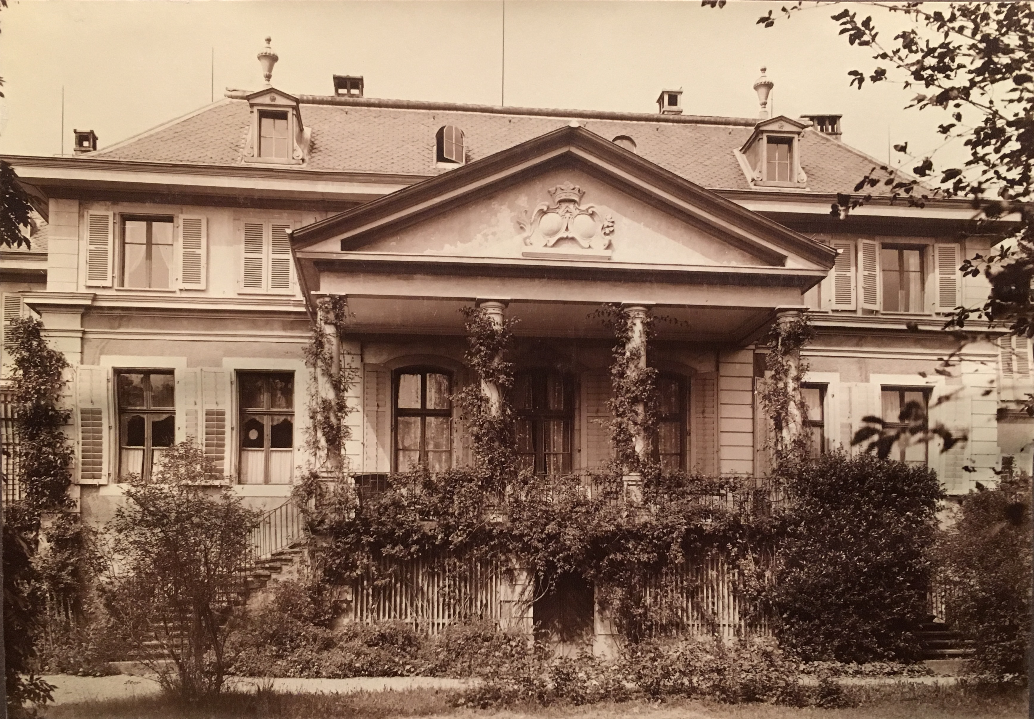 Campagne Diemerswil, von Osten